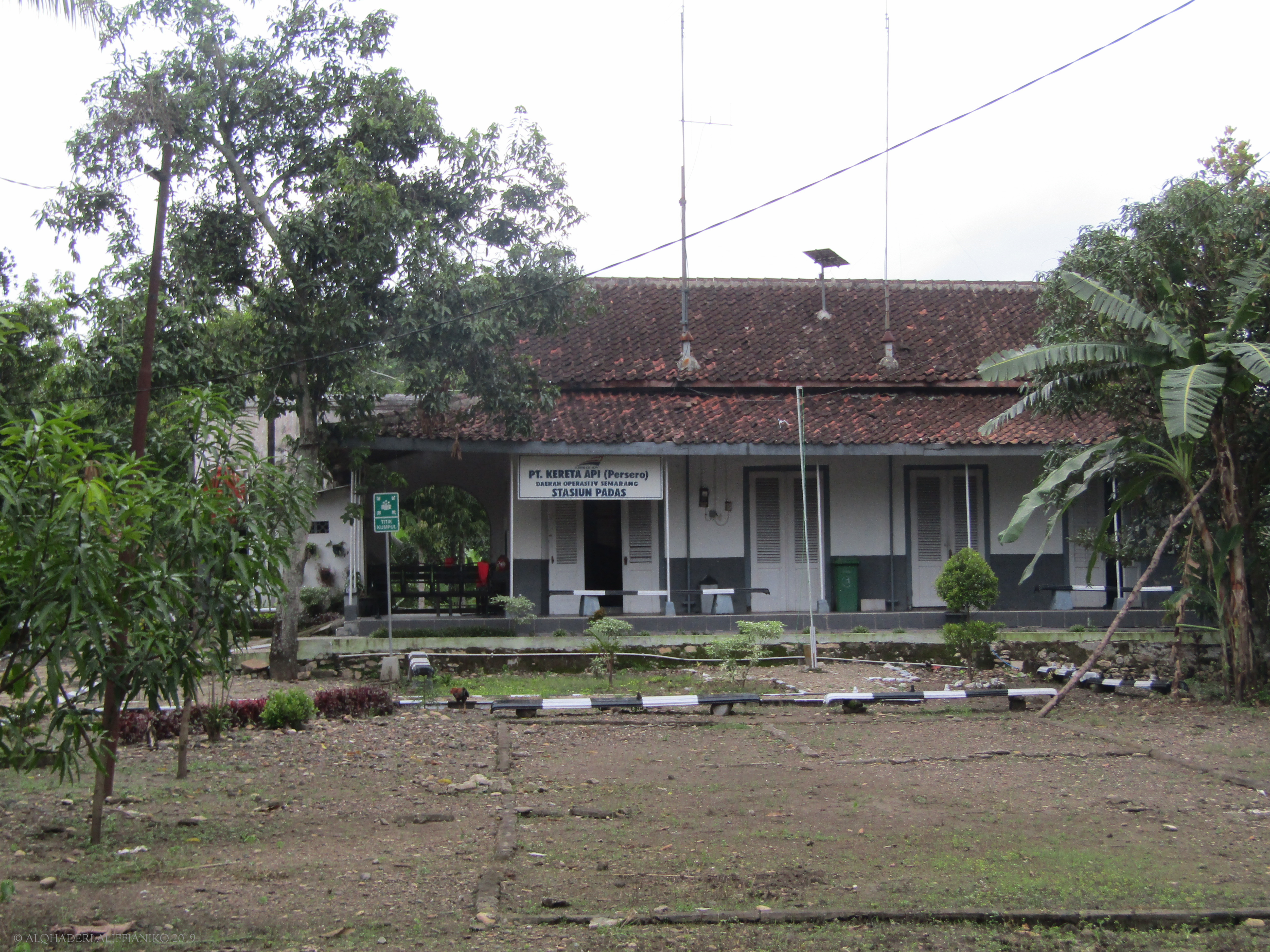 Tampak depan Stasiun Padas, 2019